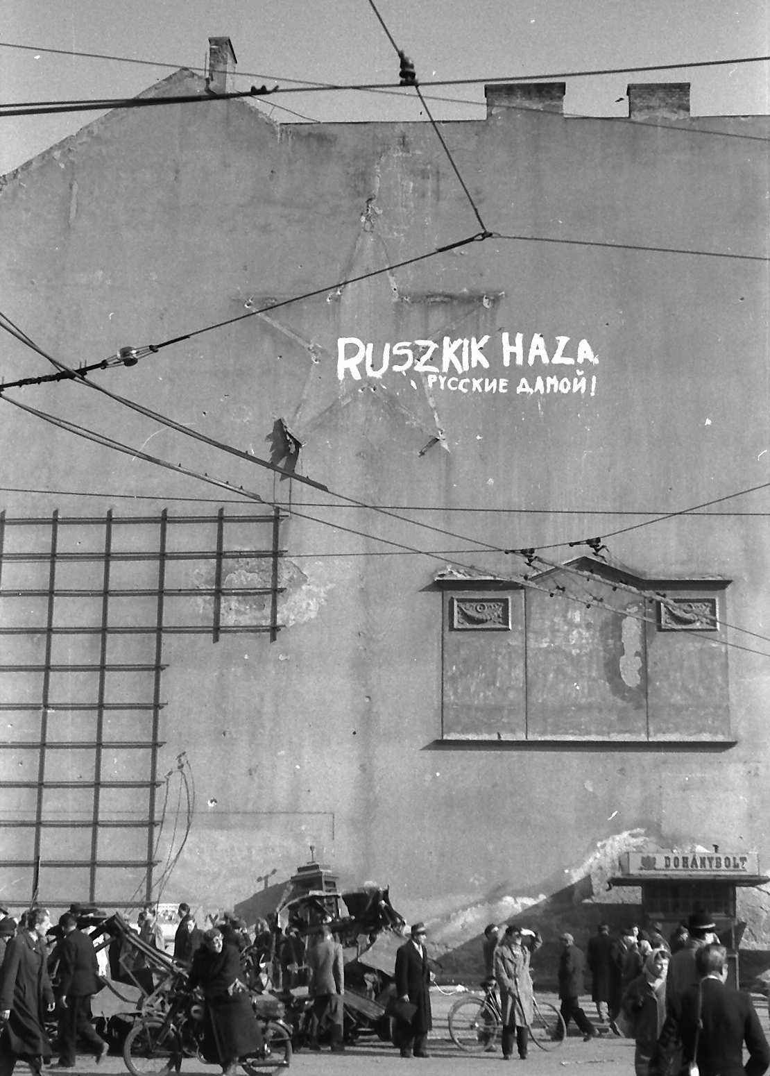 Kálvin tér, tűzfal a Baross utca és a Múzeum utca között. Location: Hungary, Budapest VIII. Tags: label, Budapest, revolution Title: Kálvin tér, tűzfal a Baross utca és a Múzeum utca között.